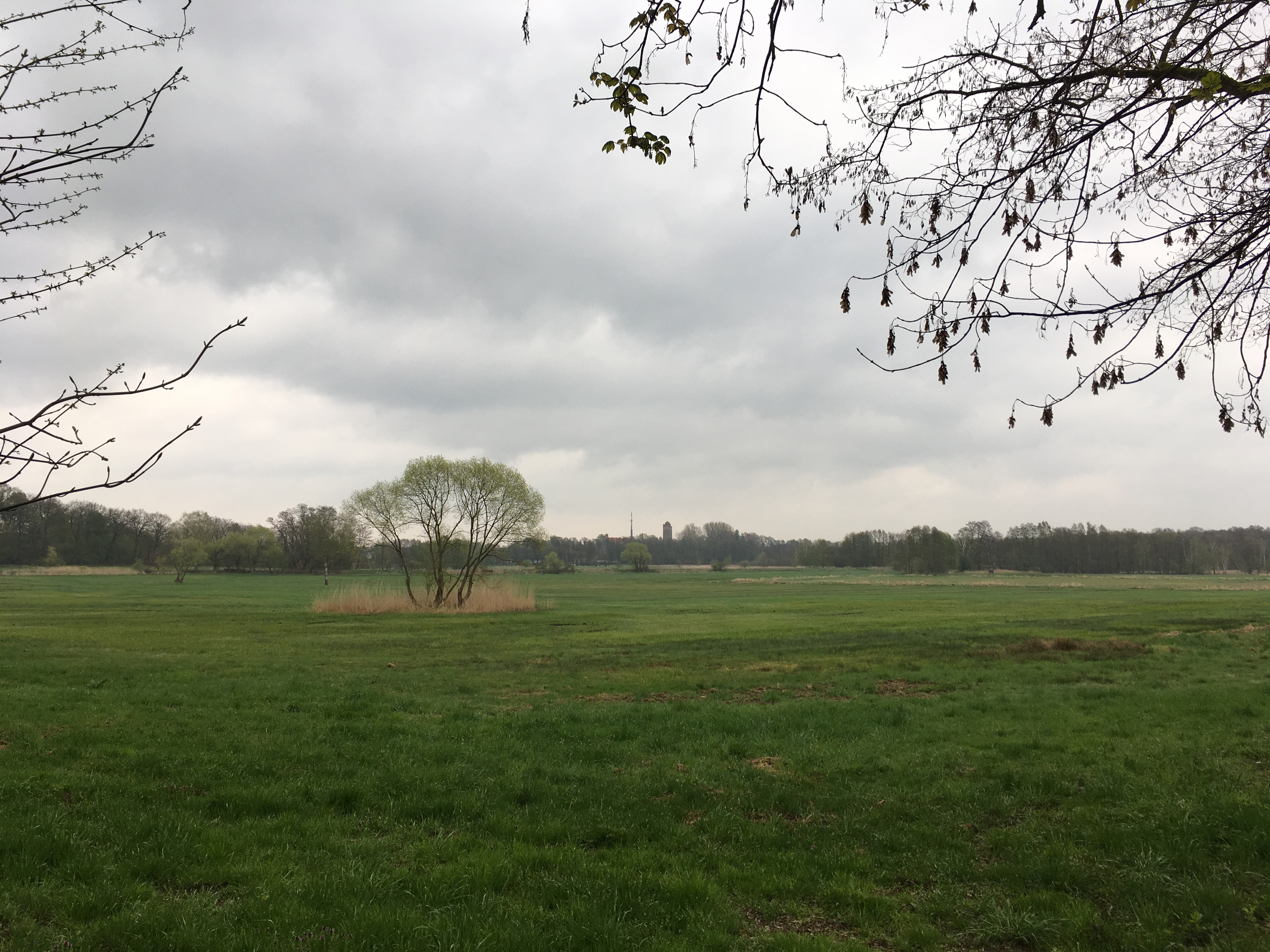 Alter See in Ziesar (Brandenburg), eine mittlerweile durch Entwässerung trockengelegte Fläche, die zu einer früheren Zeit ein See war.